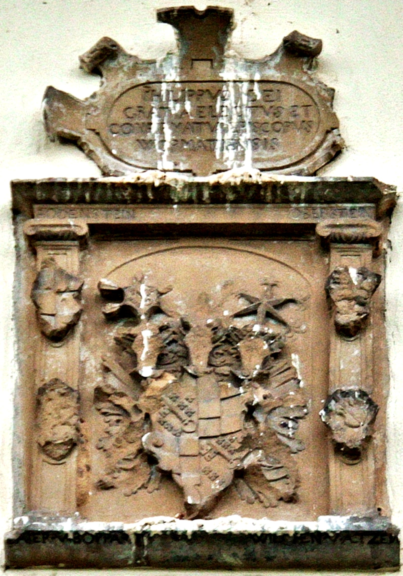 Dirmstein, Bischöfliches Schloss. Wappenstein des Bischofs Philipp I. von Rodenstein (+1604) am Amtshaus (Ostseite)